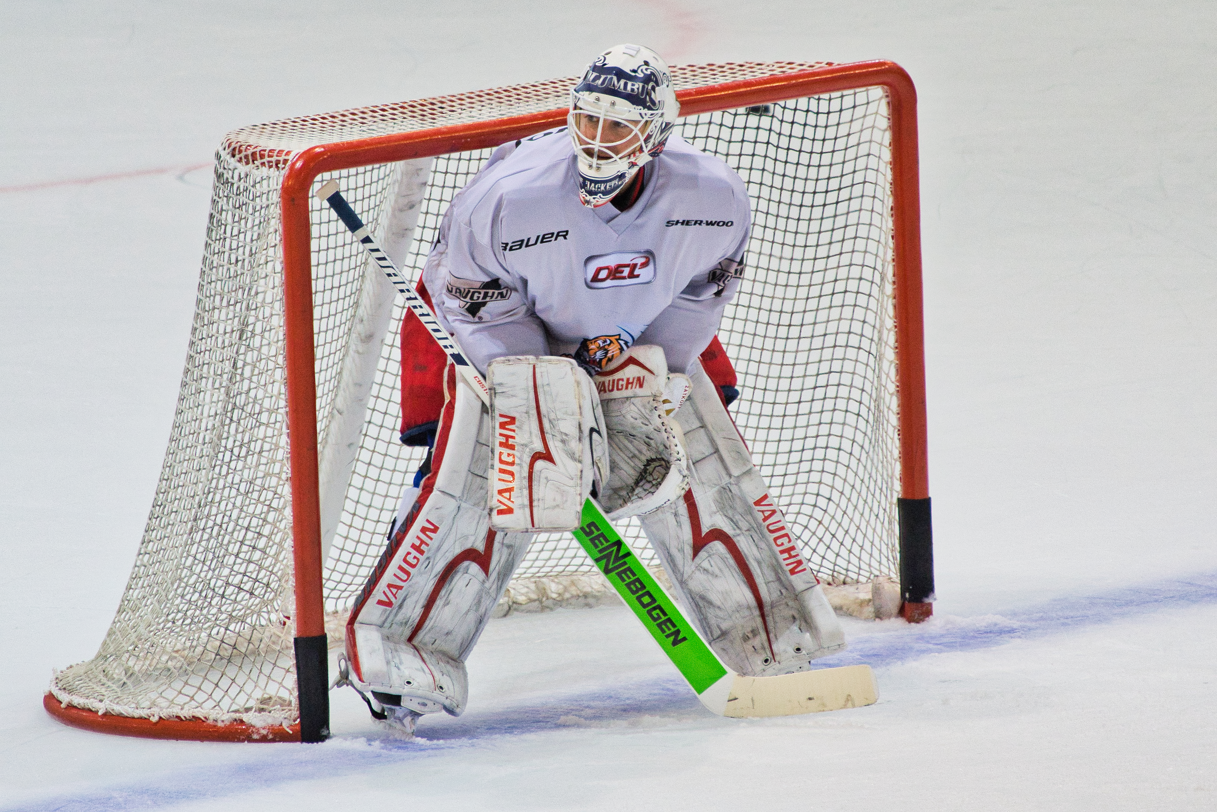 Jeff Zatkoff beim öffentlichen Training am 4. August 2018.